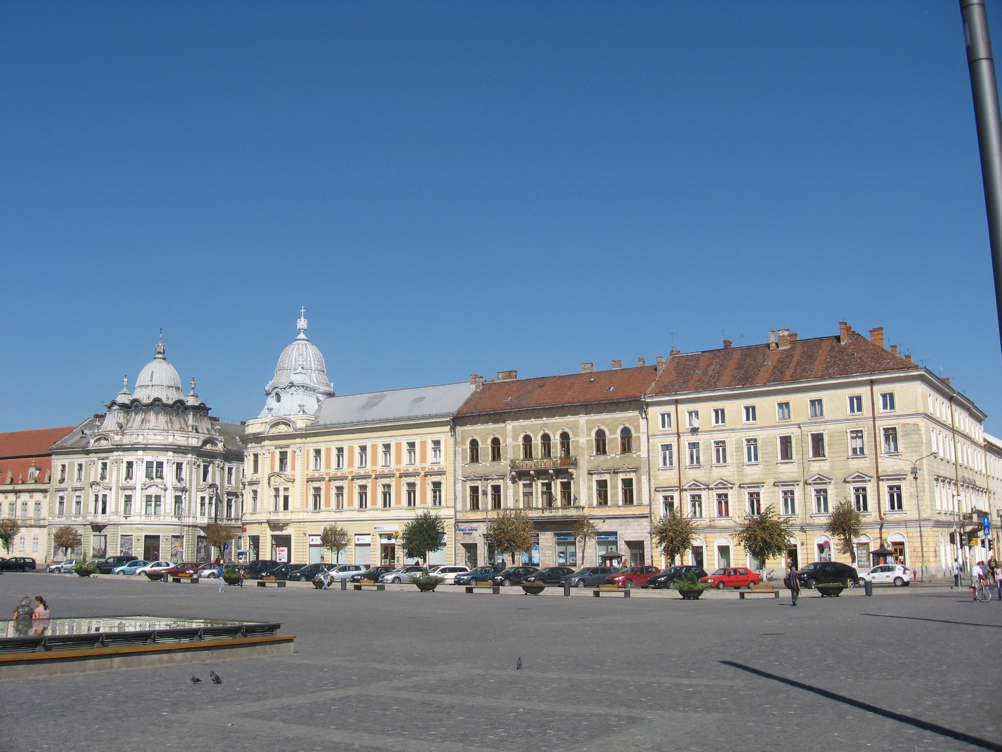 Cluj-Napoca, Piaţa Unirii